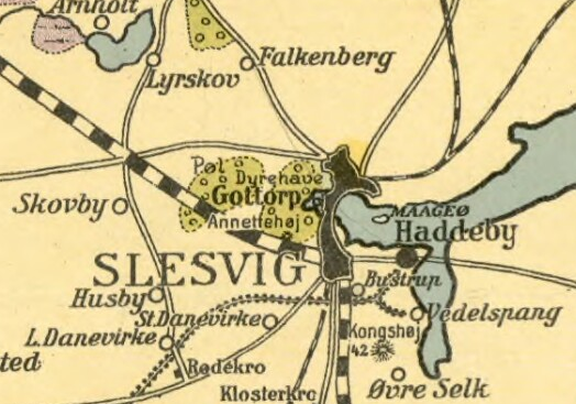 Kort over Slesvig by og Dannevirket, Detail fra Gustav Rosendals Sønderjyllandkort med amtsgrænserne fra 1913